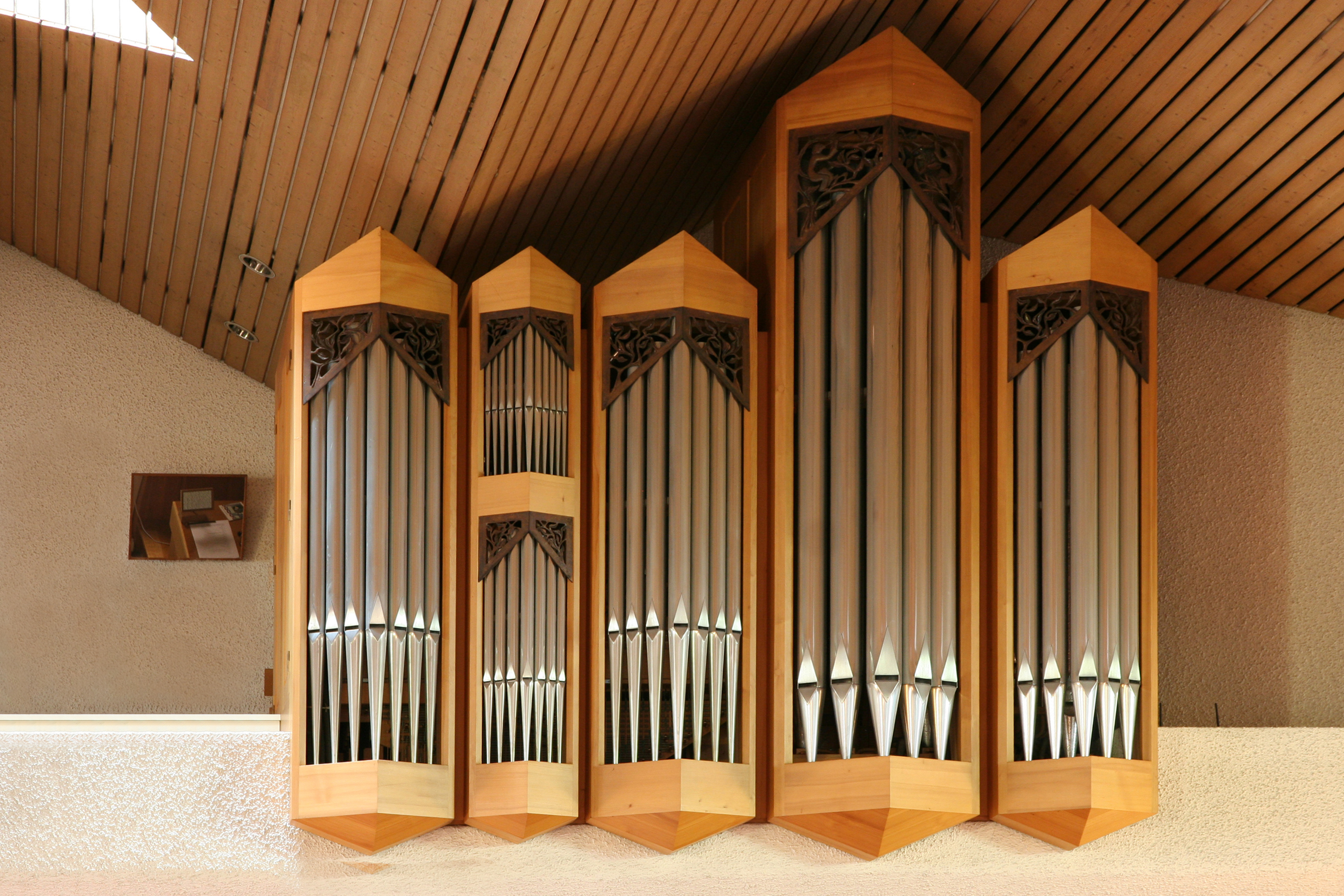 Römisch-katholische Kirche St. Nikolaus Rüschlikon, Mathis-Orgel (1984)